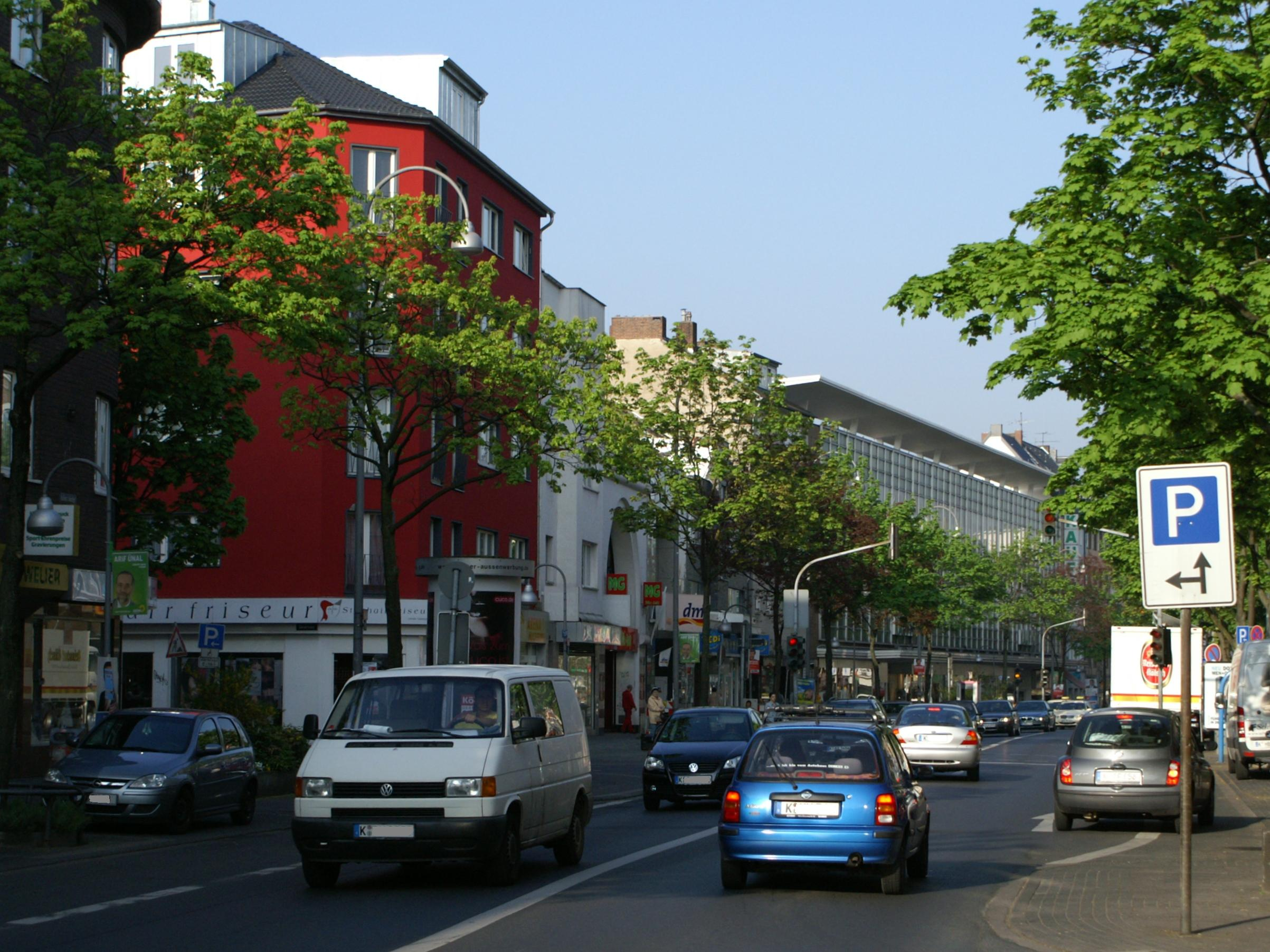 Kalker Hauptstraße vom Osten aus gesehen.